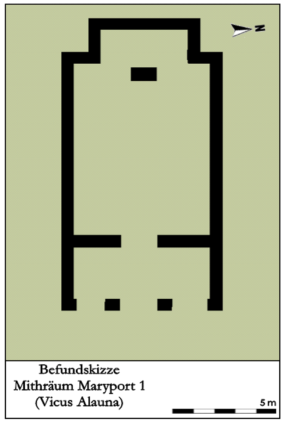 Befundskizze des Mithras-Tempel in Maryport (GB), Stand 2014.